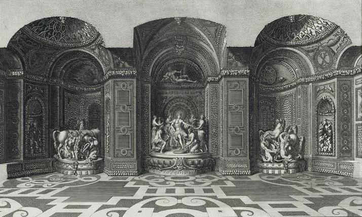 “Vue du fond de la Grotte de Téthys de Versailles”